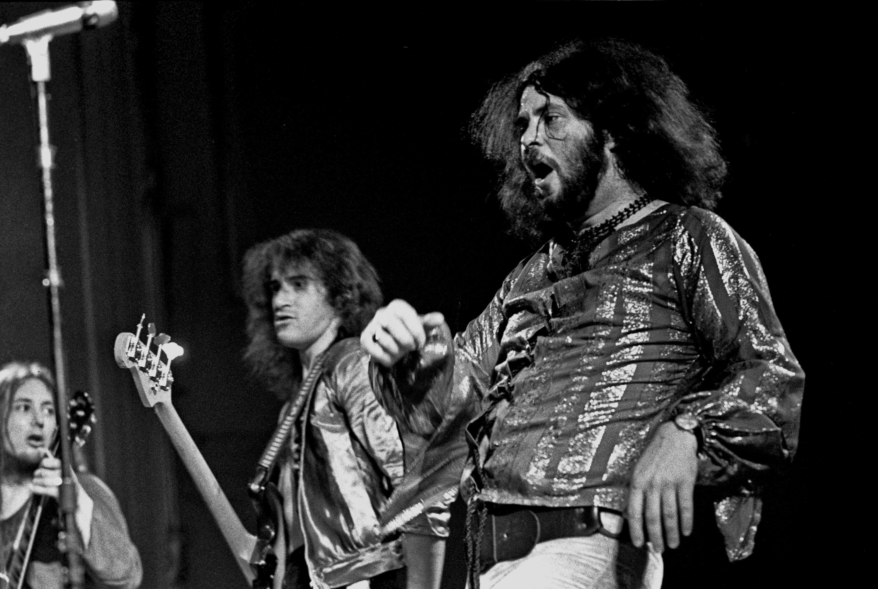 Gentle Giant, Musikhalle Hamburg, April 1974: Derek Shulman (voc, guitar): Ray + Derek Shulman